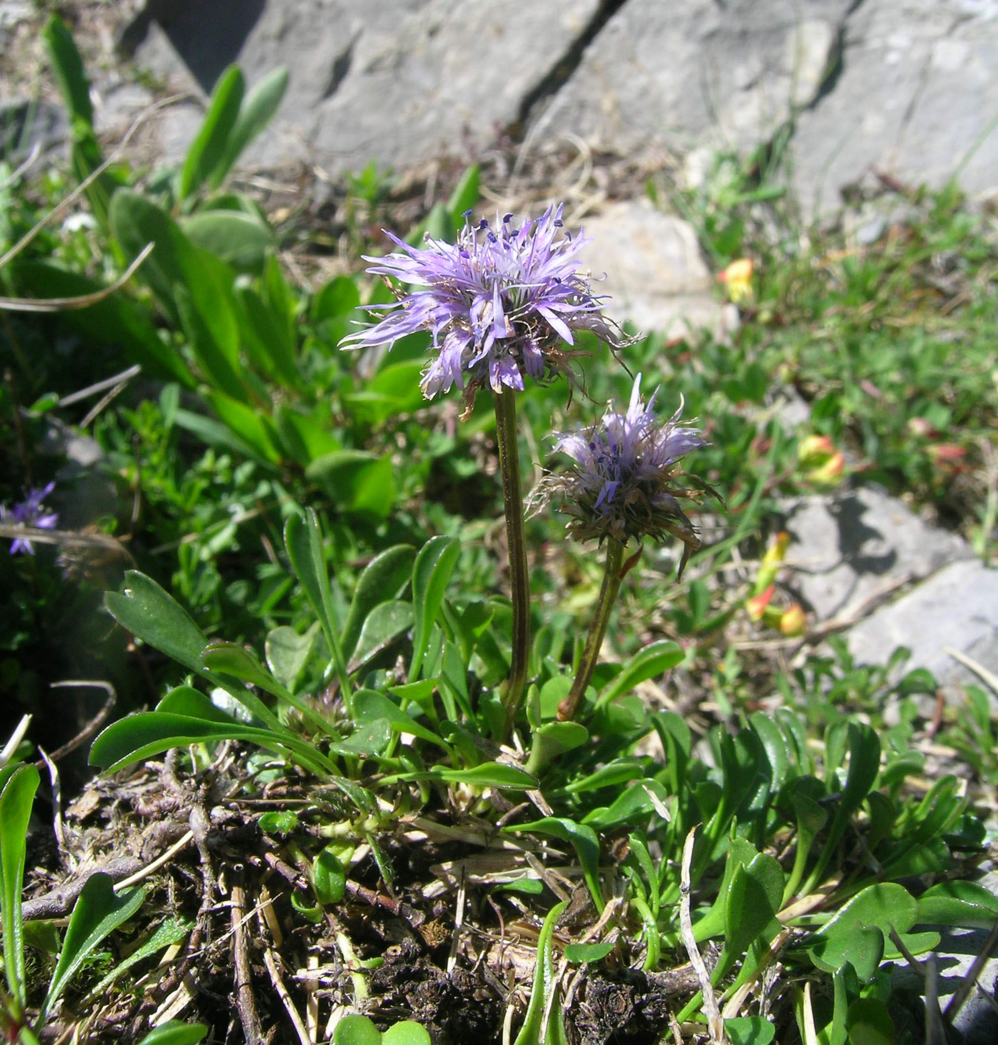 Globularia cordifolia, Schynige Platte, Kanton Bern, Schweiz